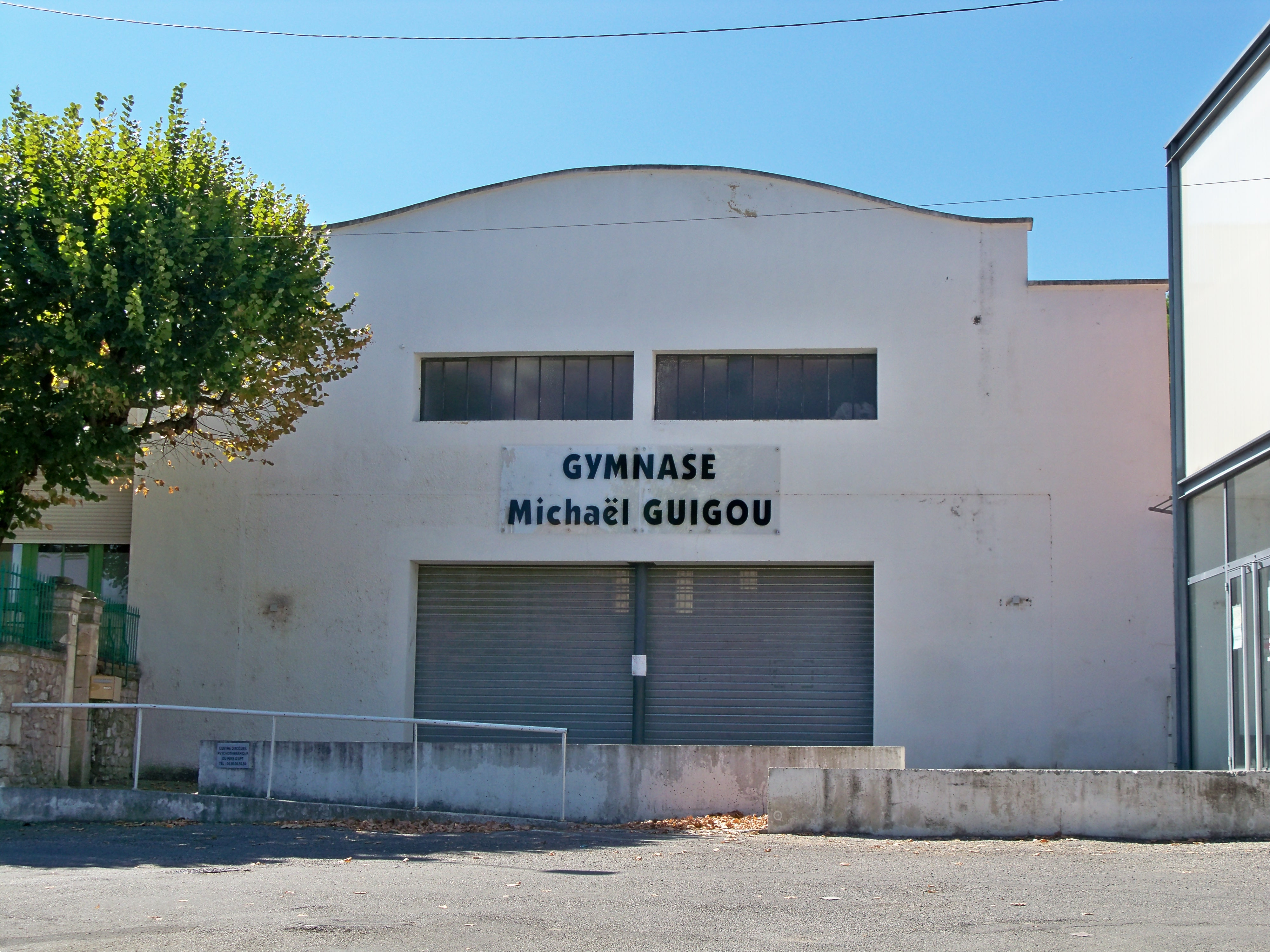 Facade du gymnase Michael Guigou, à Apt (Vauclse)